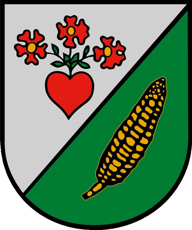 Wappen der Gemeinde Wettmannstätten